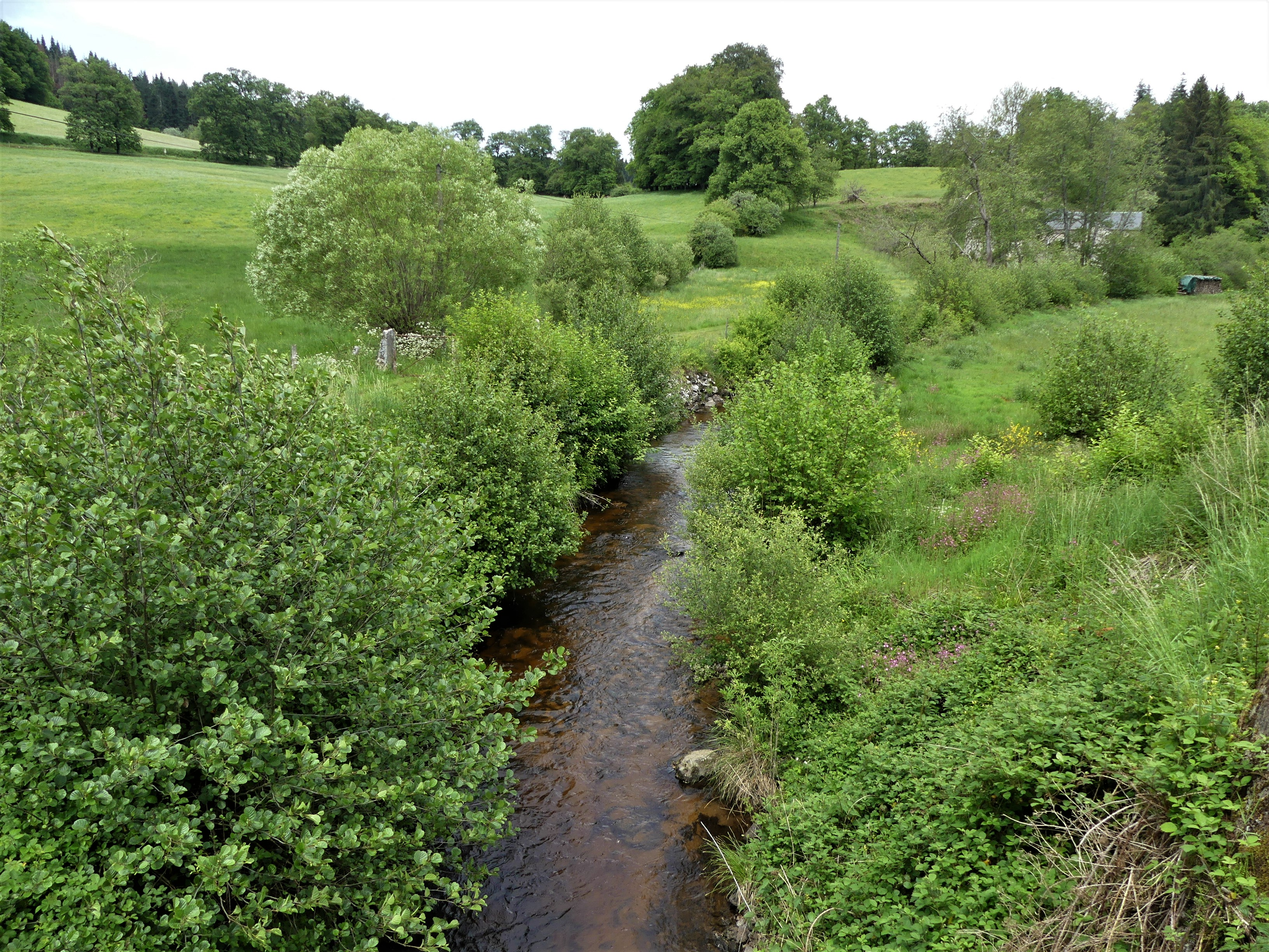 La Feuillade en amont du pont de la route départementale 996, La Villedieu, Creuse, France.